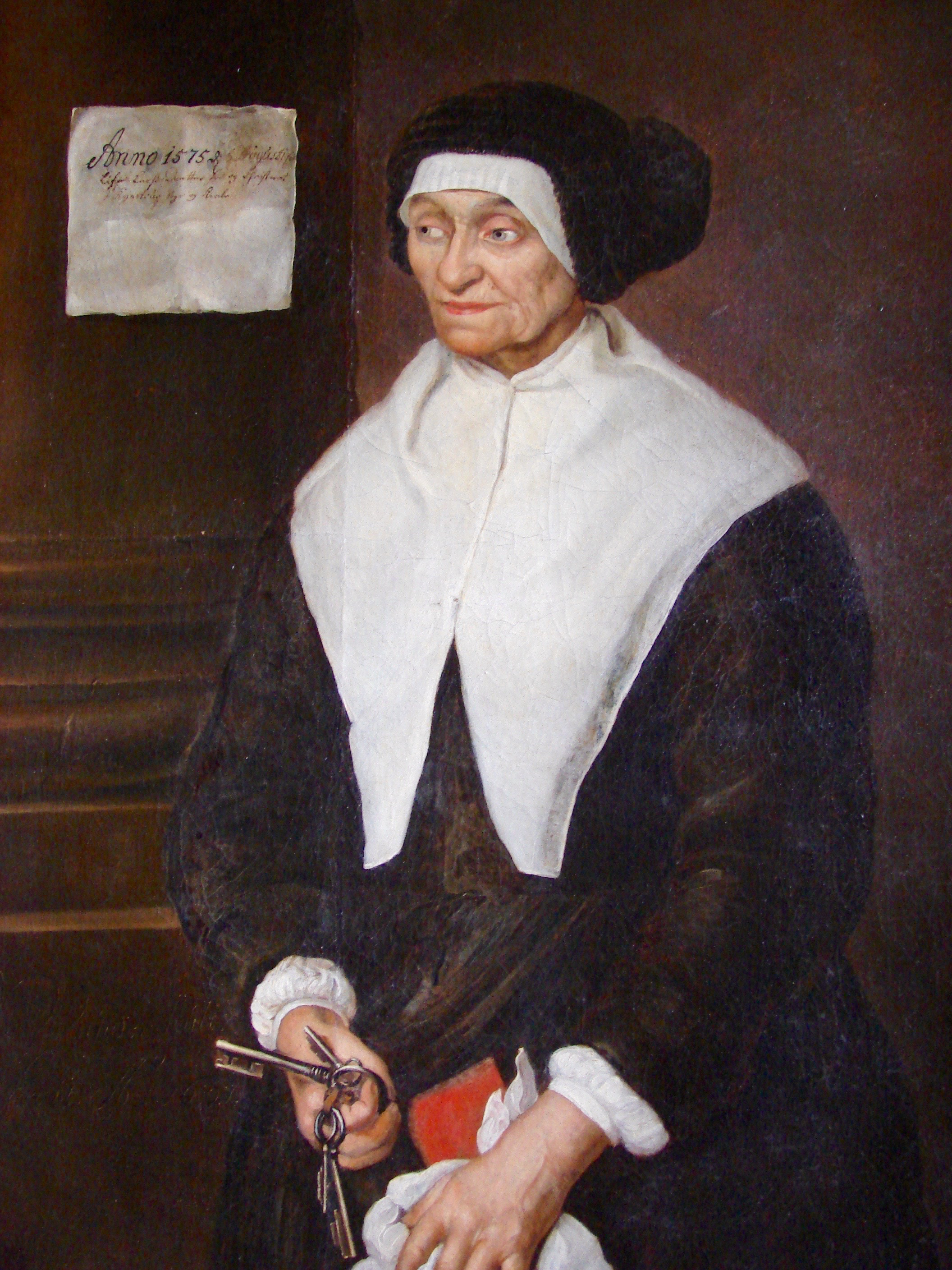 Live Larsdatter, Tycho Brahes husholderske (detail)